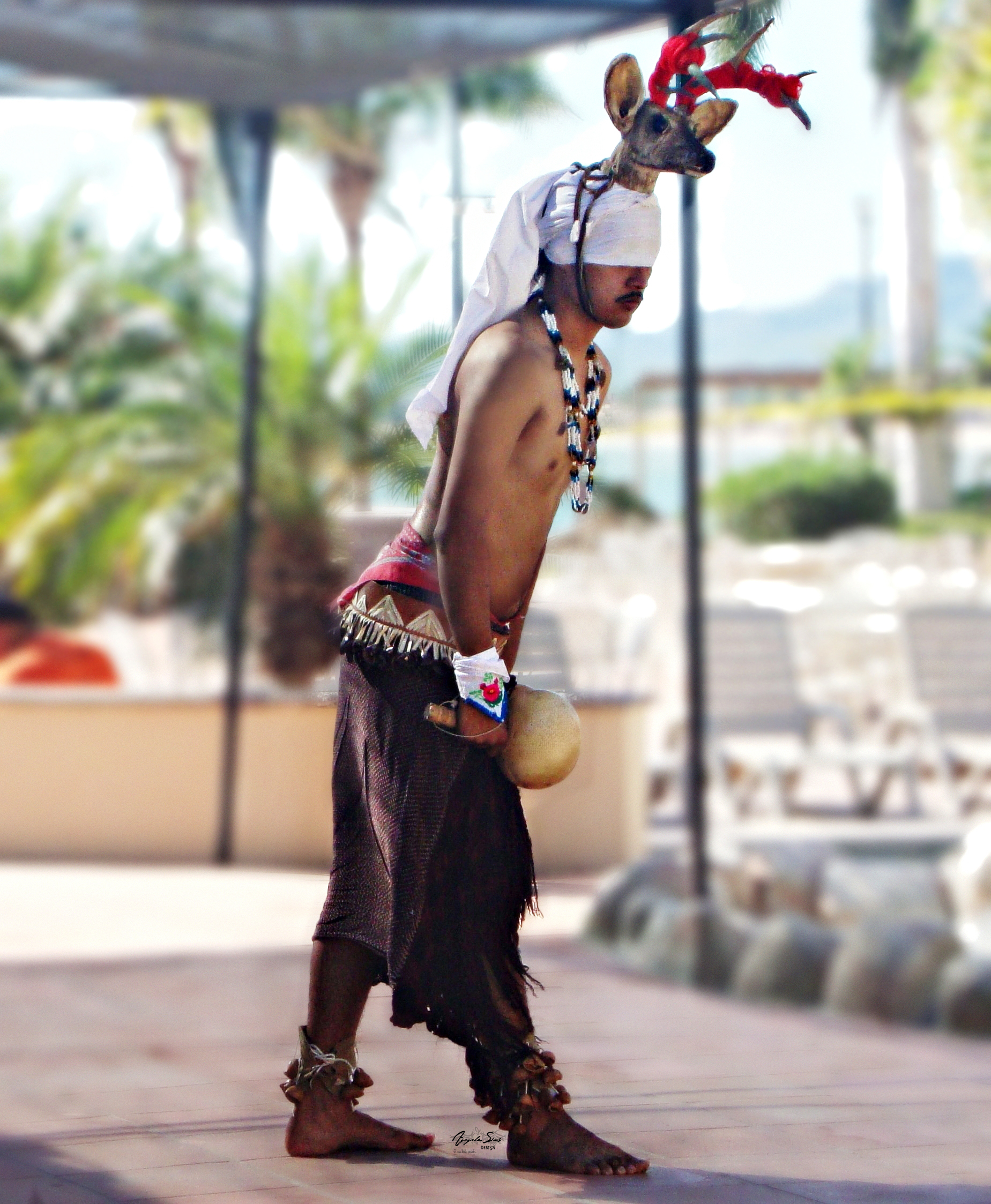 Danza del Venado en San Carlos Nuevo Guaymas, Sonora